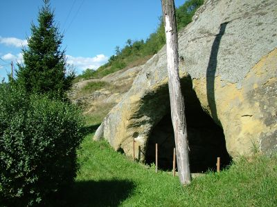 Sziklakápolna Istenmezején